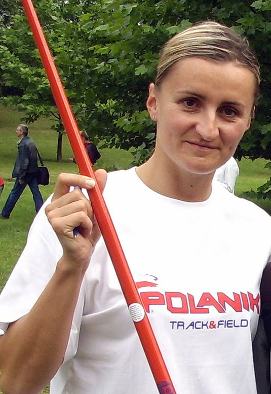 Barbara MadejczykMadejczyk Barbara